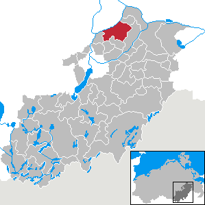 Brunn in Mecklenburg-Vorpommern, Landkreis Mecklenburg-Strelitz